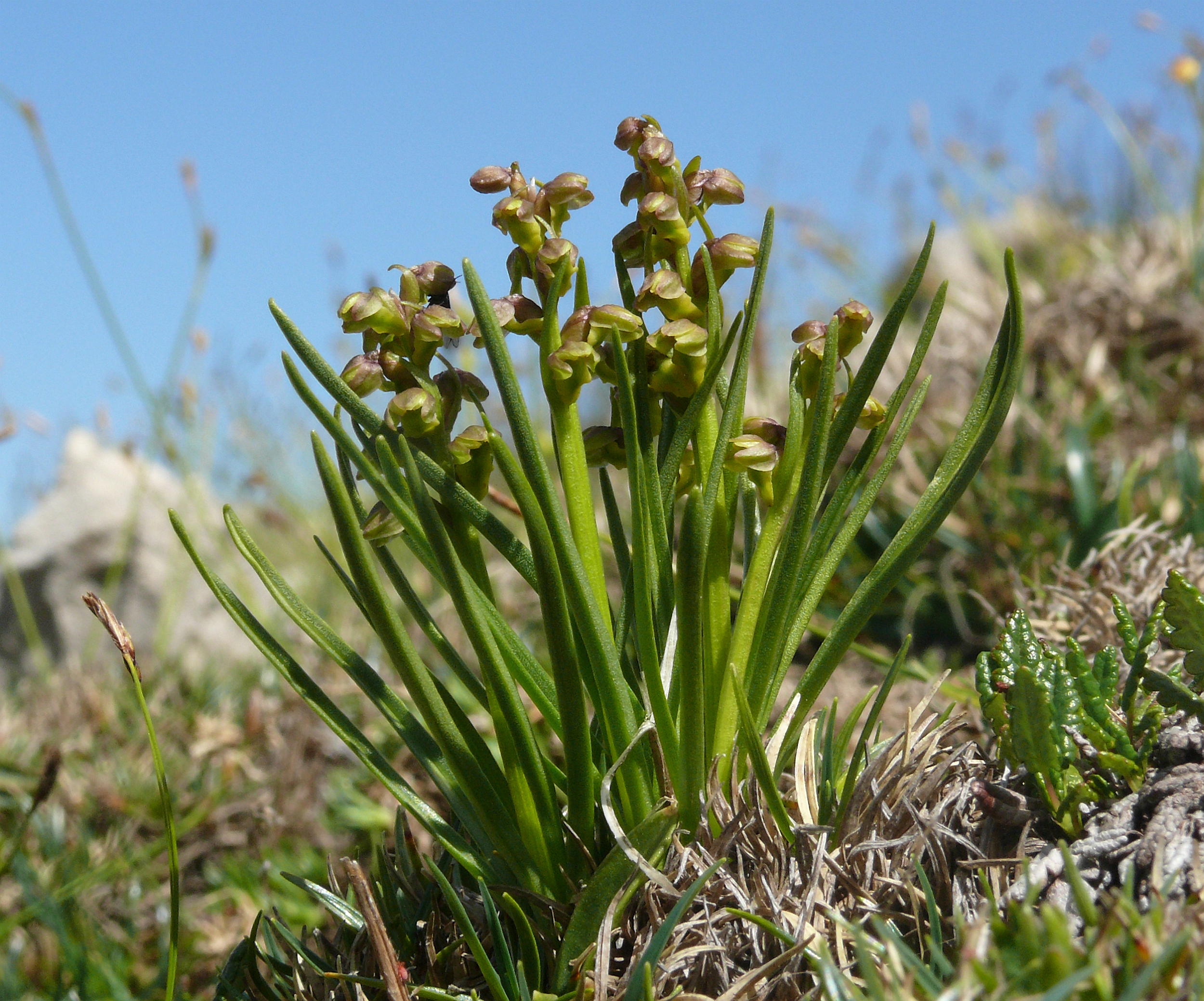 Chamorchis alpina, Allgäuer Alpen, Österreich